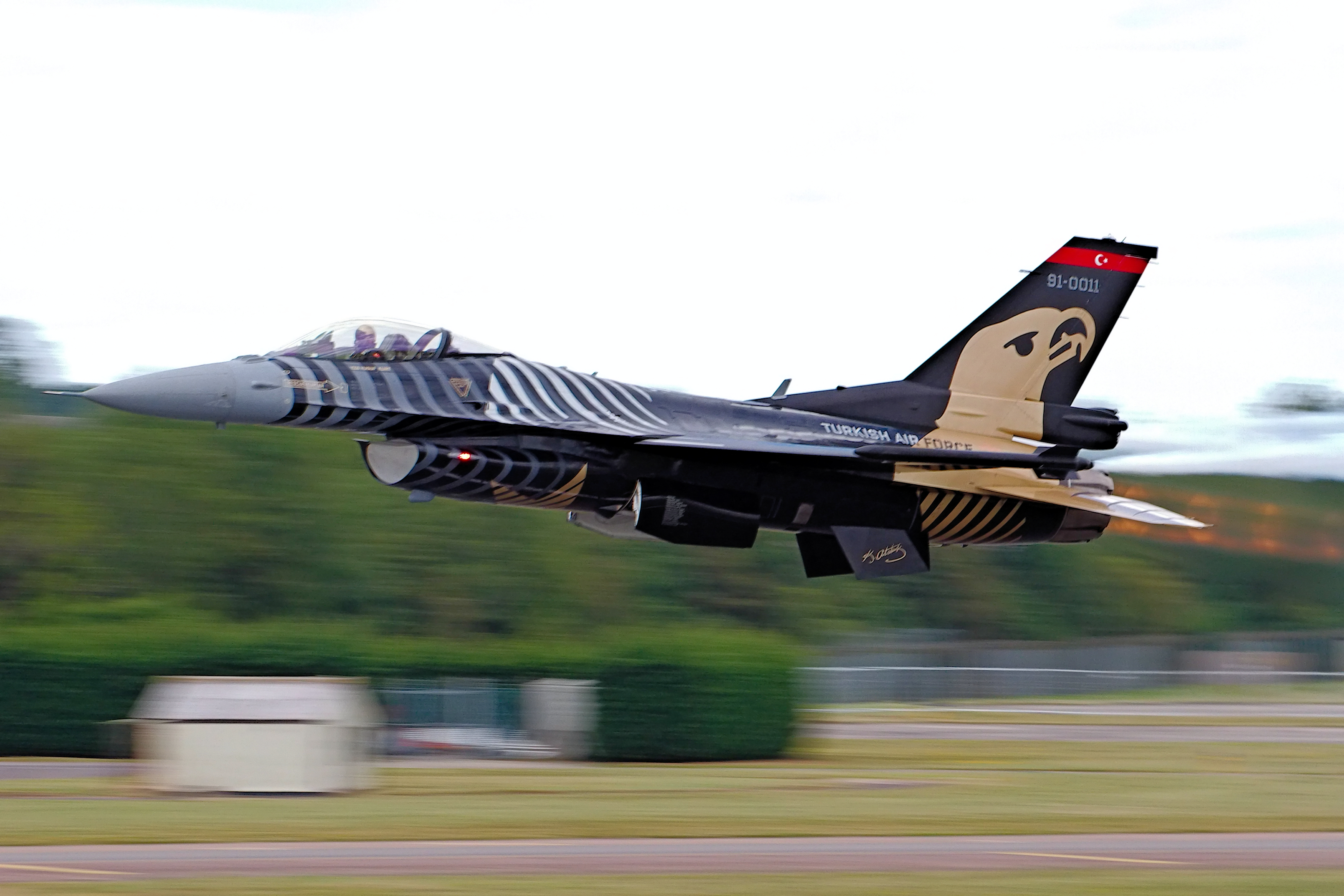 F16 - RIAT 2014